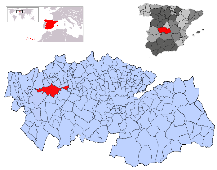 Talavera de la Reina en la provincia de Toledo